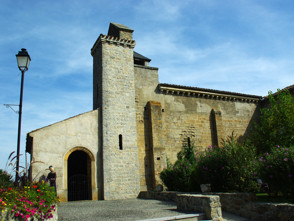 église du 12e s. .